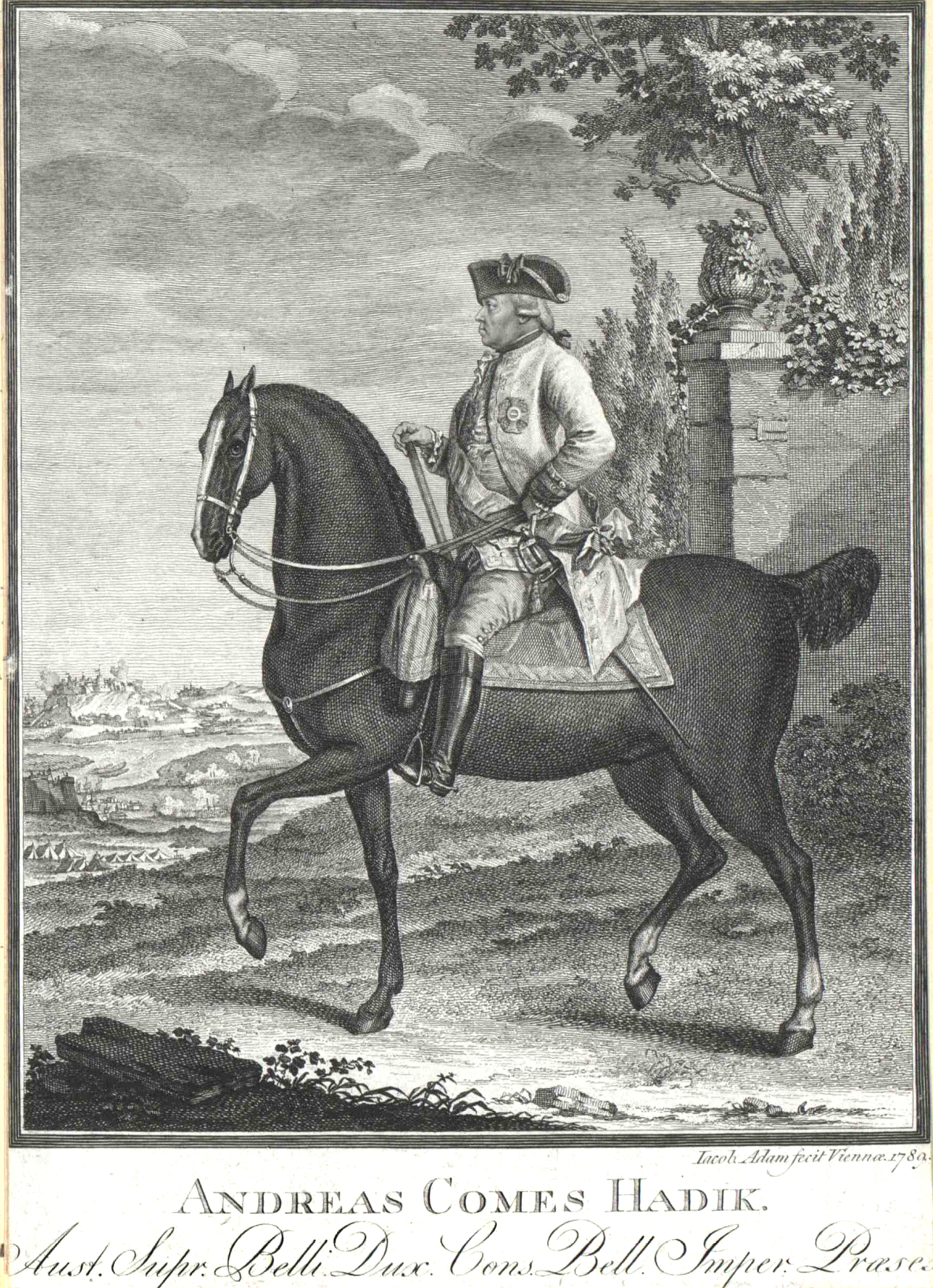 Hadik von Futak, Andreas Graf (1711 - 1790)